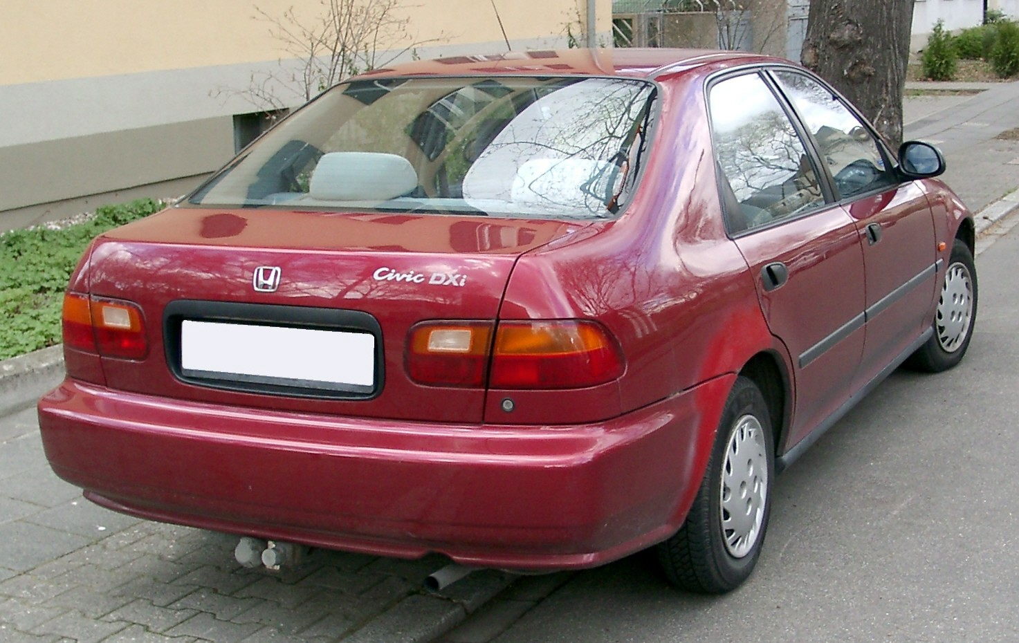 Honda Civic, 5. Generation